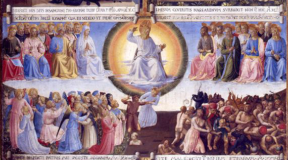 Armadio degli argenti, giudizio universale